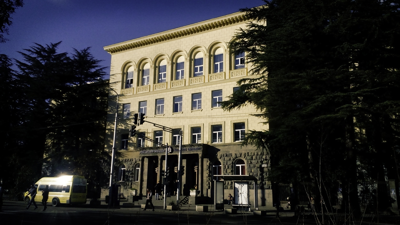 ილიას სახელობის უნივერსიტეტი. E კორპუსი.